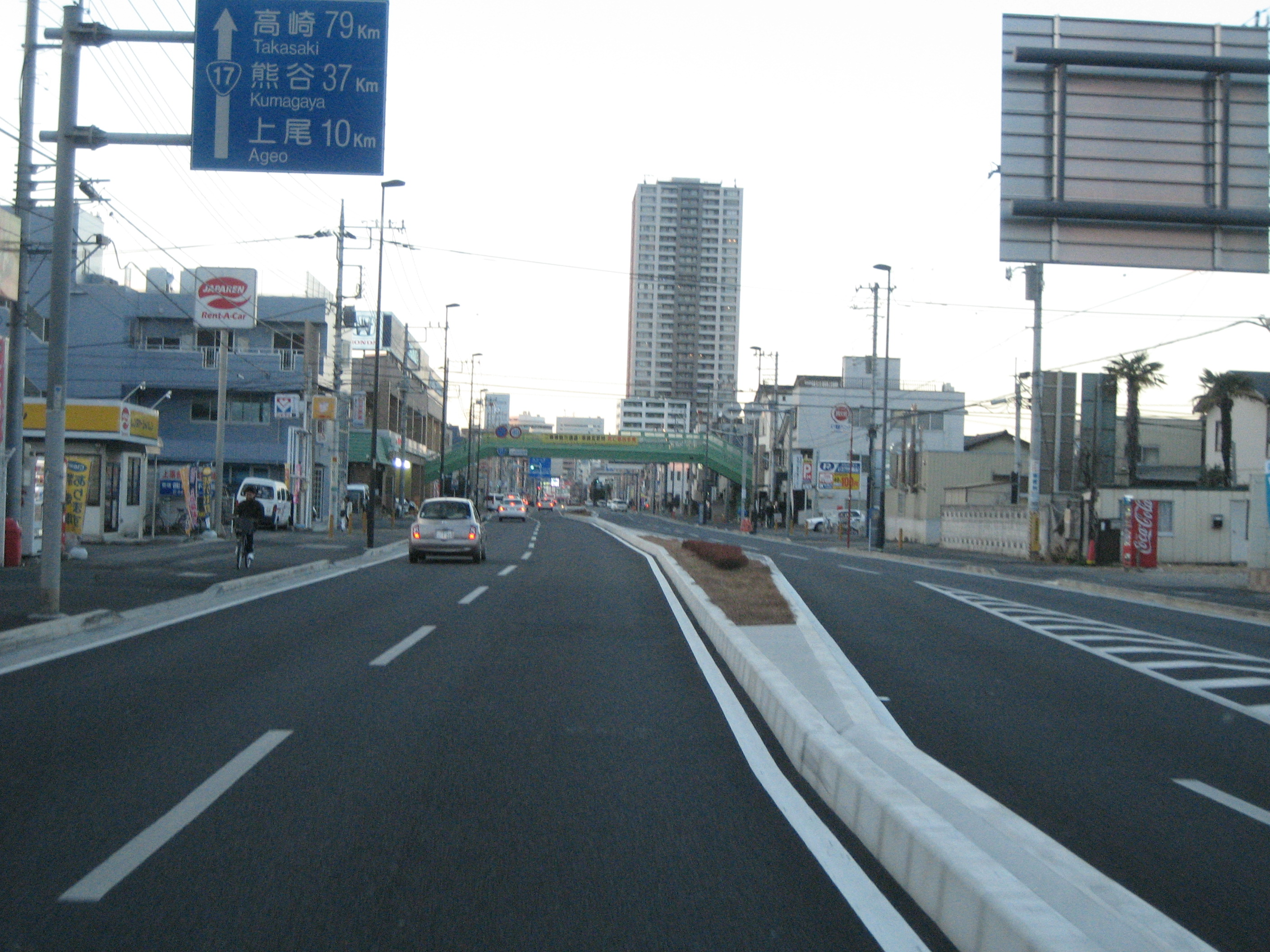 国道17号線与野道路中央区内